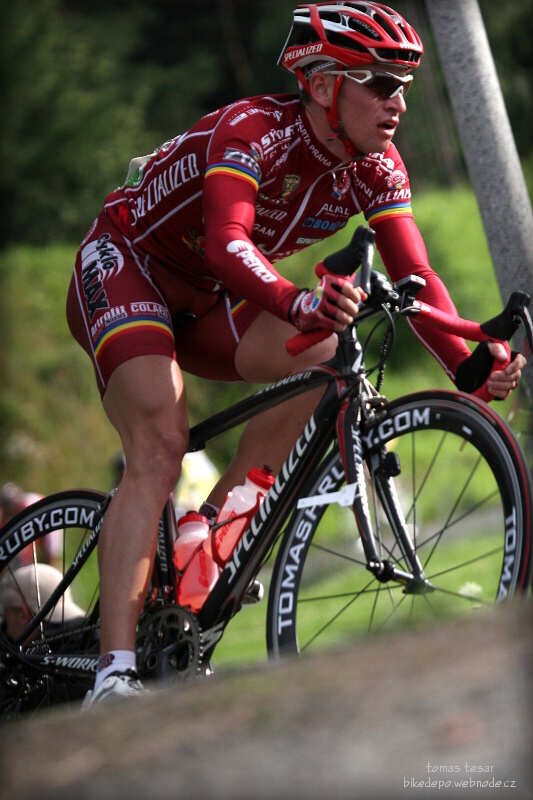 Při závodech